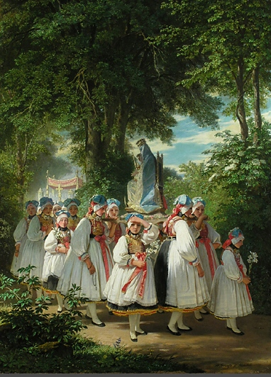 Die Marienprozession, Öl auf Leinwand, 96 x 70 cm